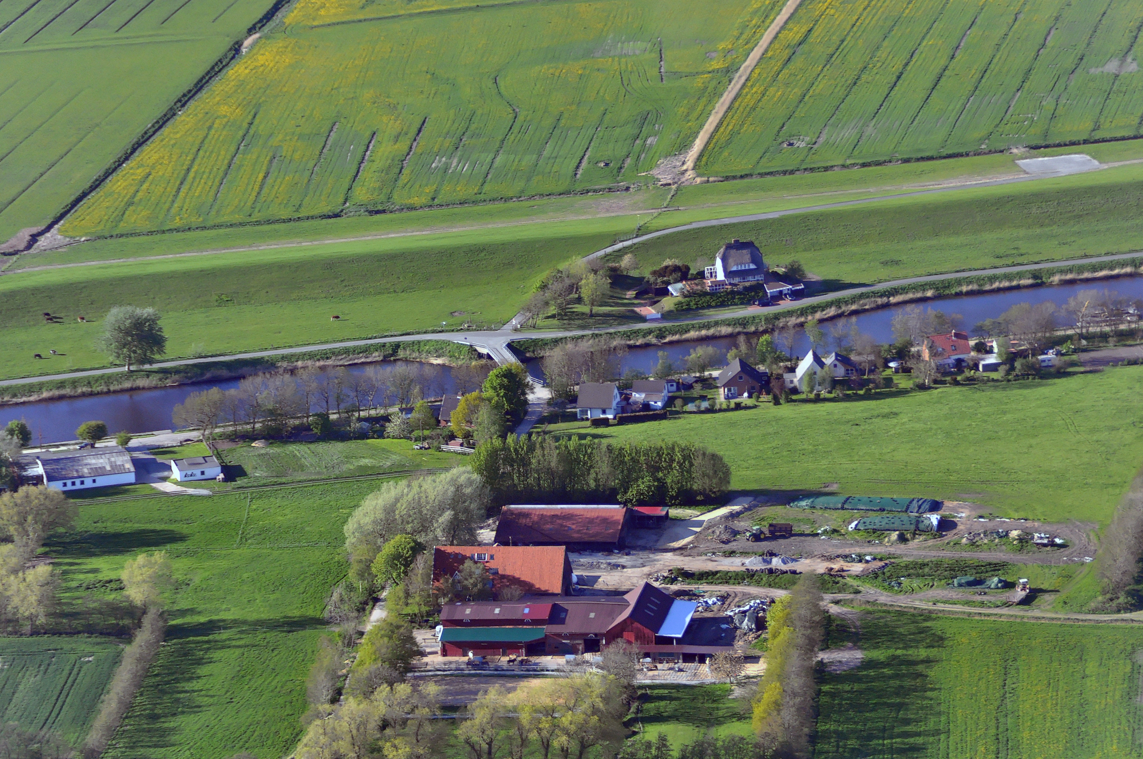 Luftbilder von der Nordseeküste 2012-05